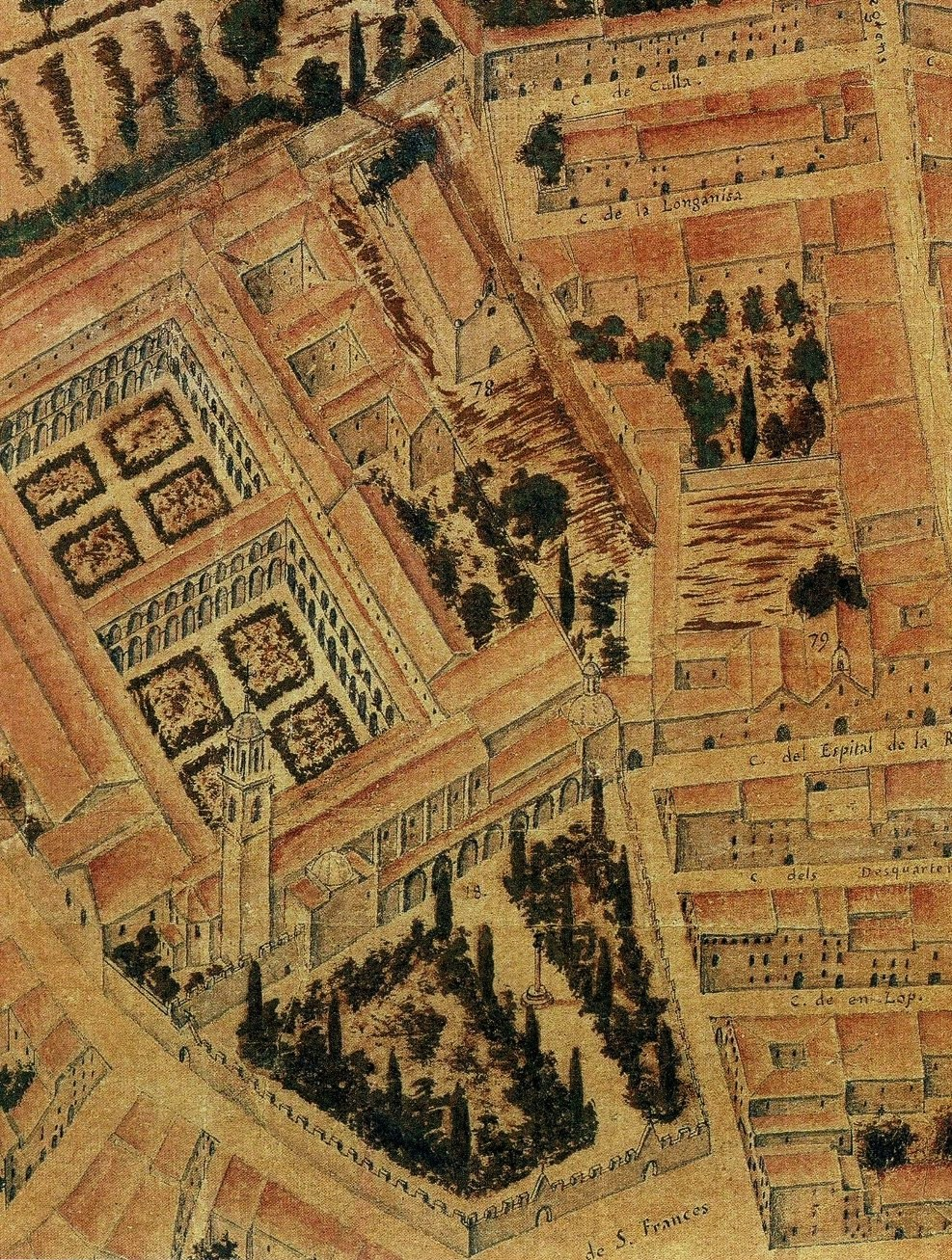 El convent de sant Francesc de València el 1704 segons el plànol de Tosca. Actualment està desaparegut i el seu lloc l'ocupa la plaça de l'Ajuntament de la ciutat.